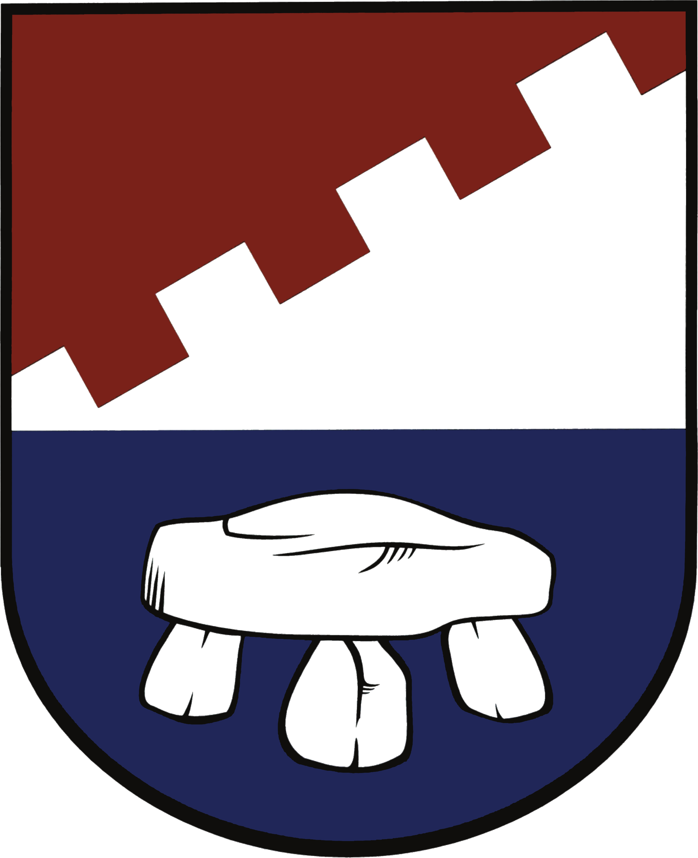 Wappen der Gemeinde Ziesendorf, Landkreis Rostock